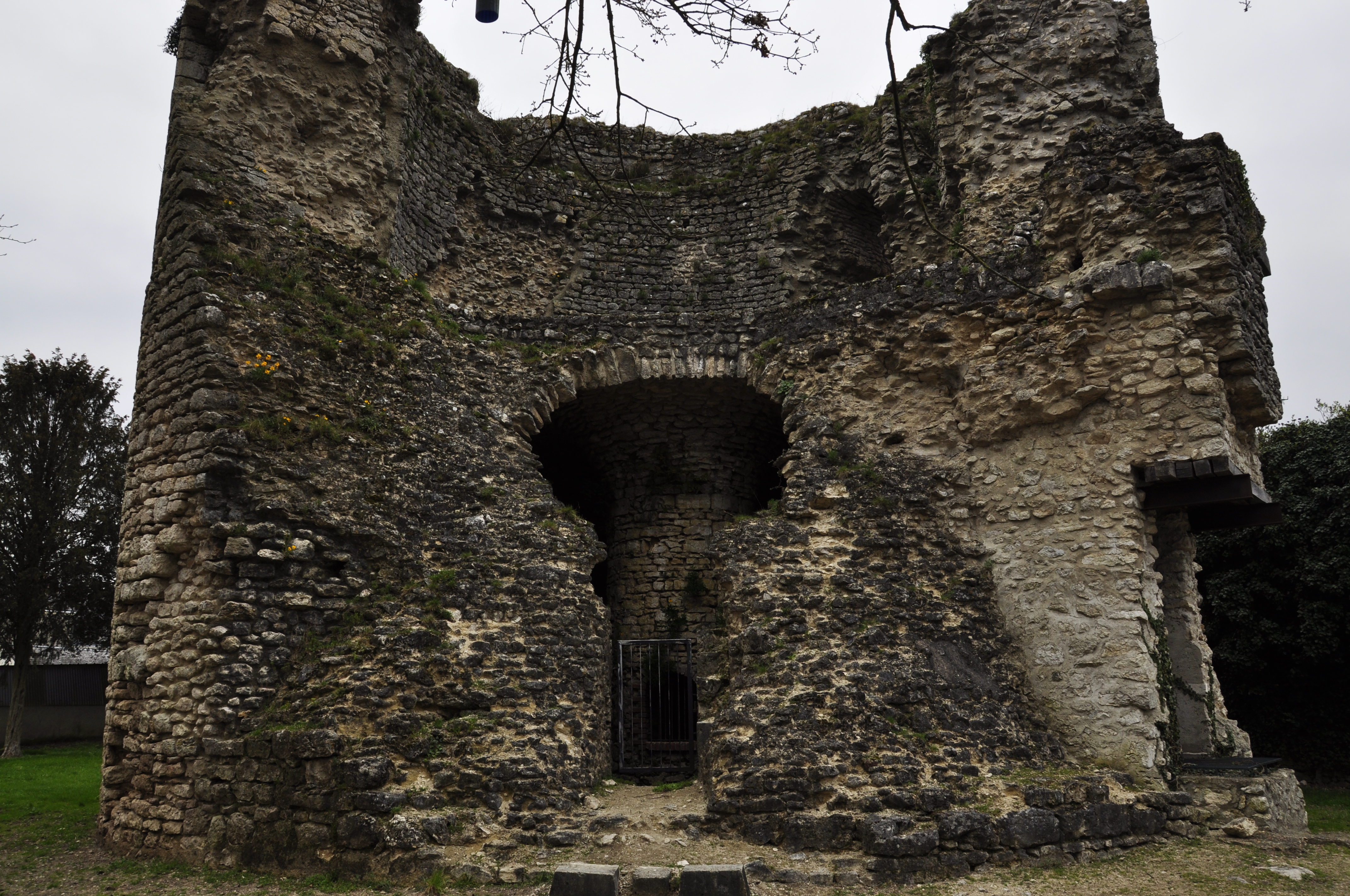 Vestiges de la tour, Les Montils, France